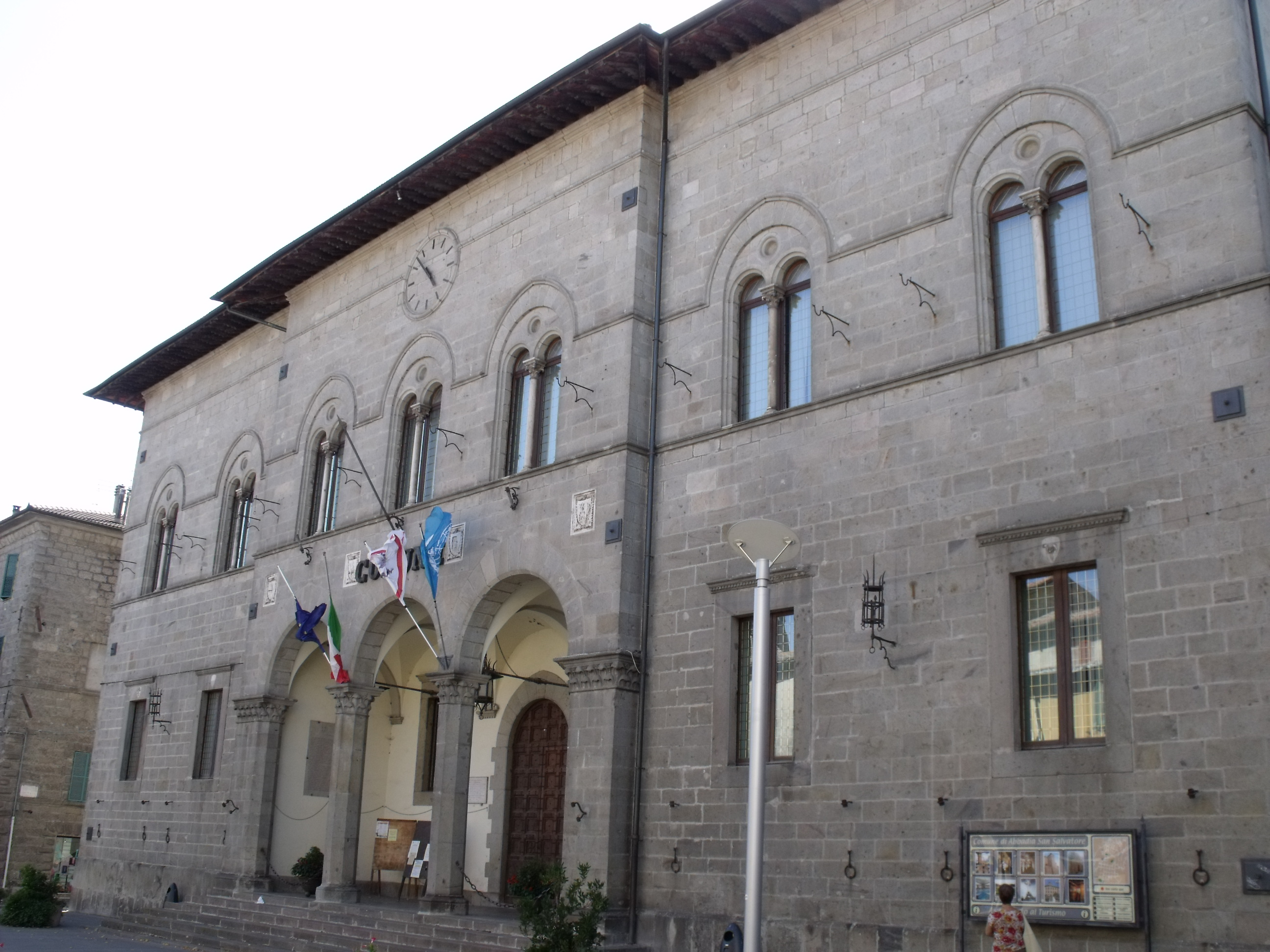 Rathaus von Abbadia San Salvatore, ehemaliger Palazzo del Podestà